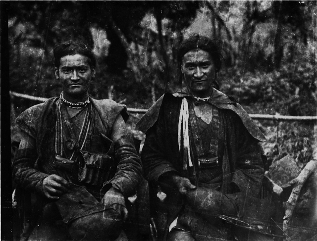 カナカナブ族の男 同じツォウ族でも、南部のサアロア族やカナカナブ族になると顔つきもどことなく柔和になる。1900年（明治33年）2月末撮影。